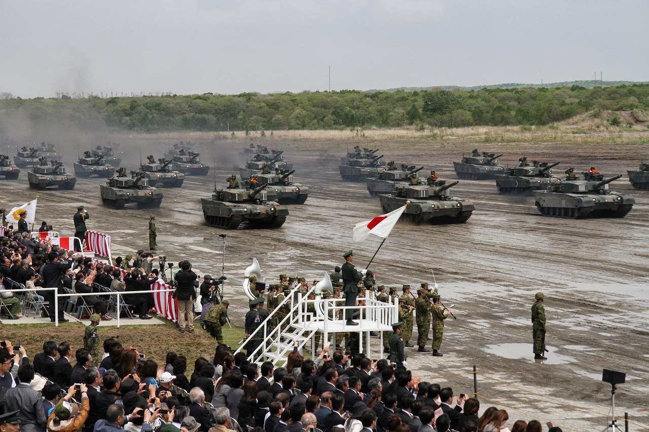 Title 25.06.02 ７Ｄ・第７師団創隊５８周年及び東千歳駐屯地創立５９周年記念行事7LPR2129.jpg Album Events and Public Relations (イベント・行事・広報活動等) 第７師団創隊５８周年及び東千歳駐屯地創立５９周年記念行事・観閲行進